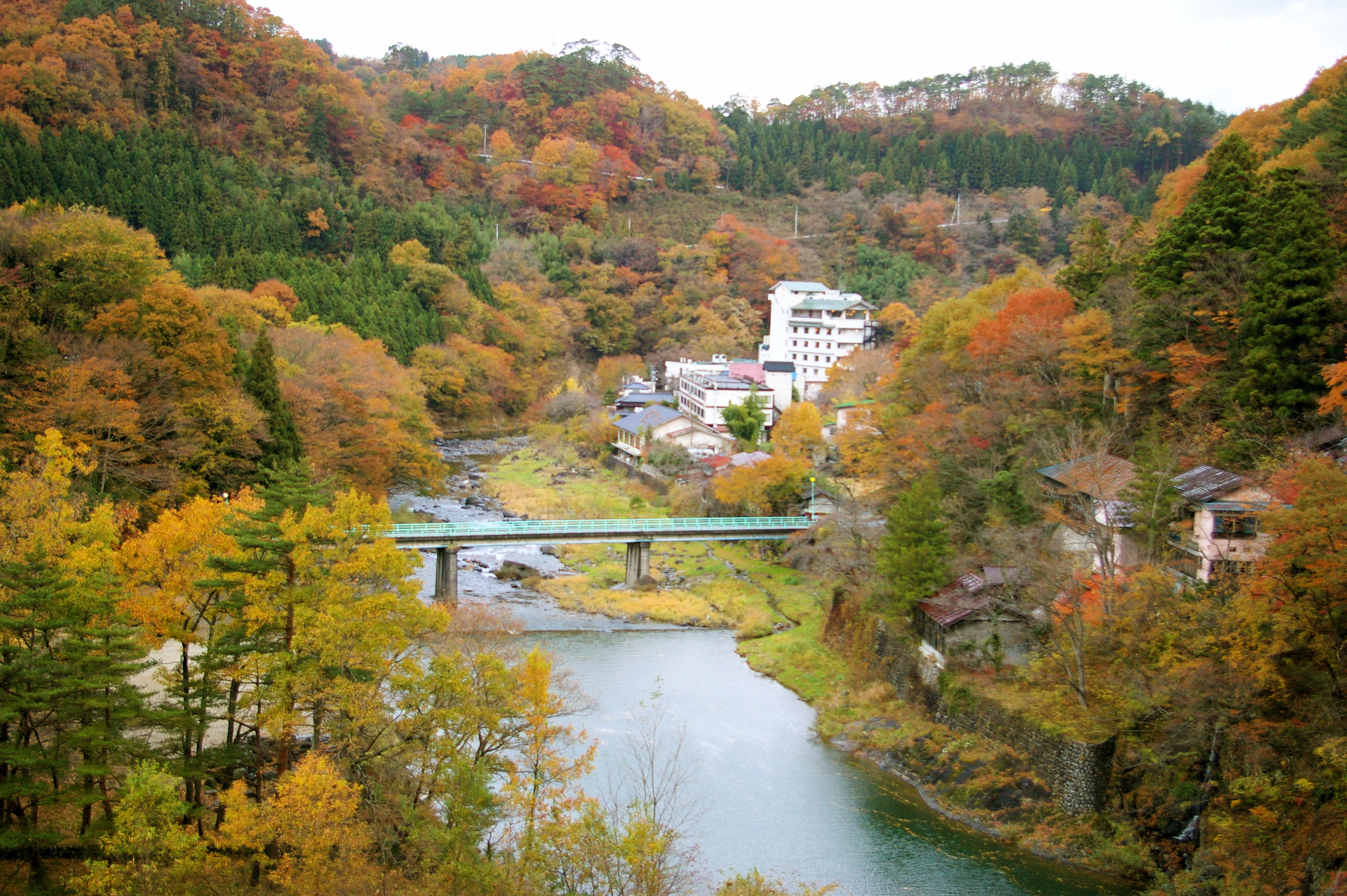 Obara Hot Spring in Autumn